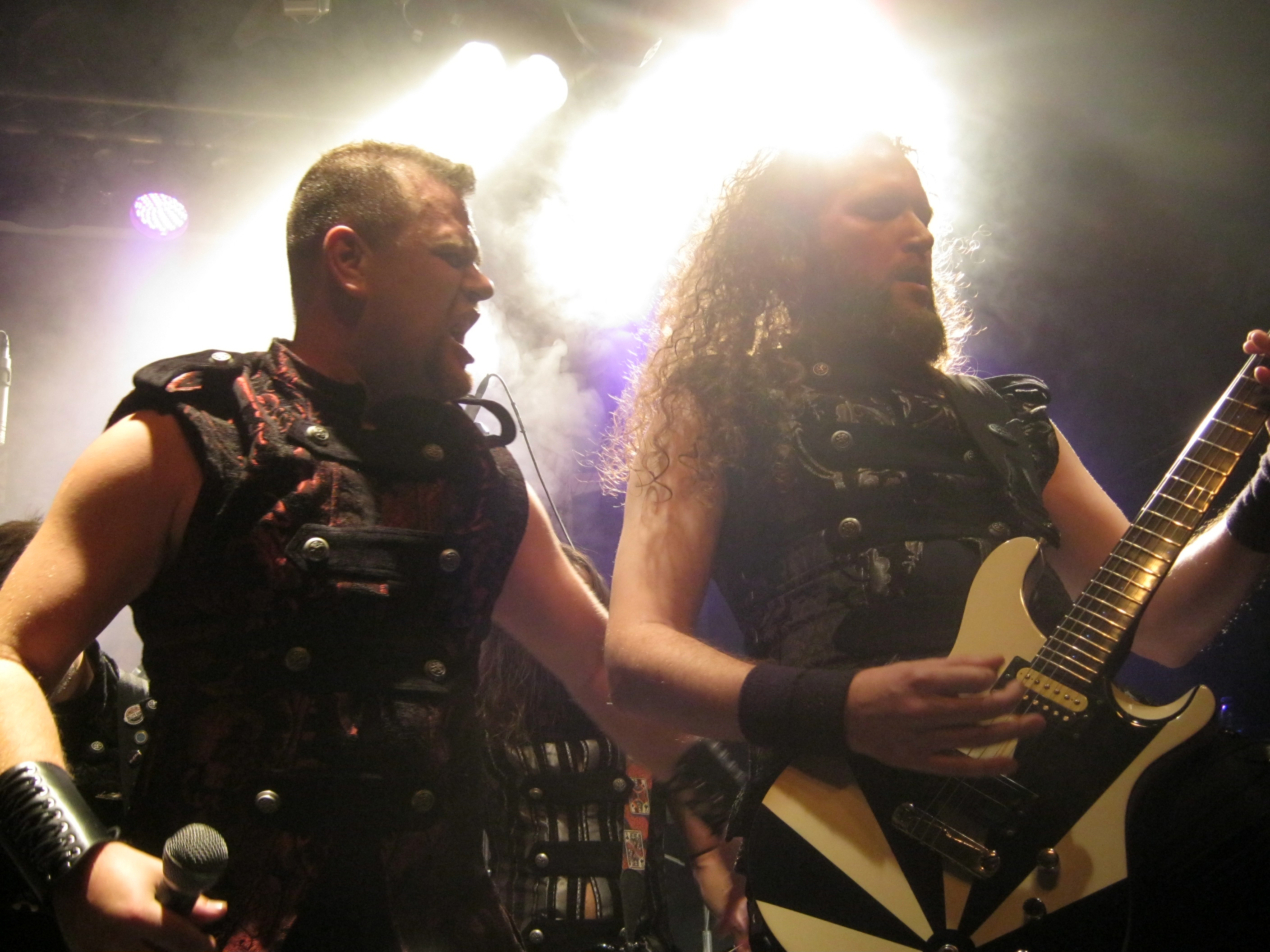 Metal band Desert (Israel).